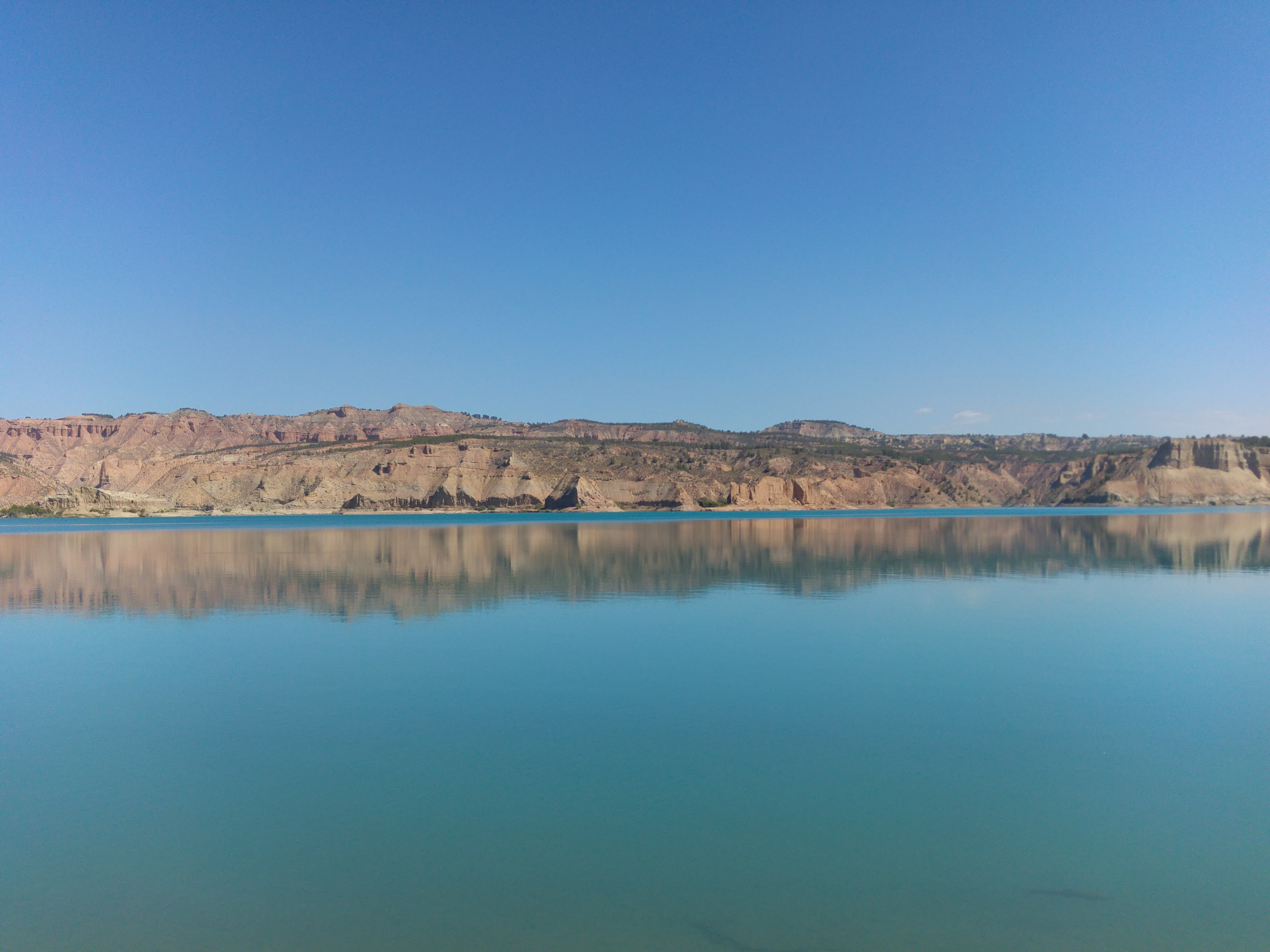 El embalse del Negratín.